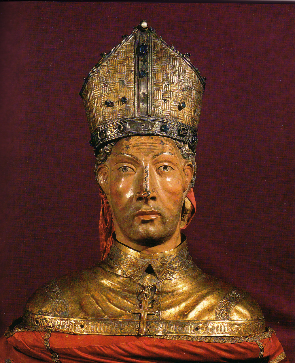 San Prudencio de Armentia. Busto de Plata del siglo XV.